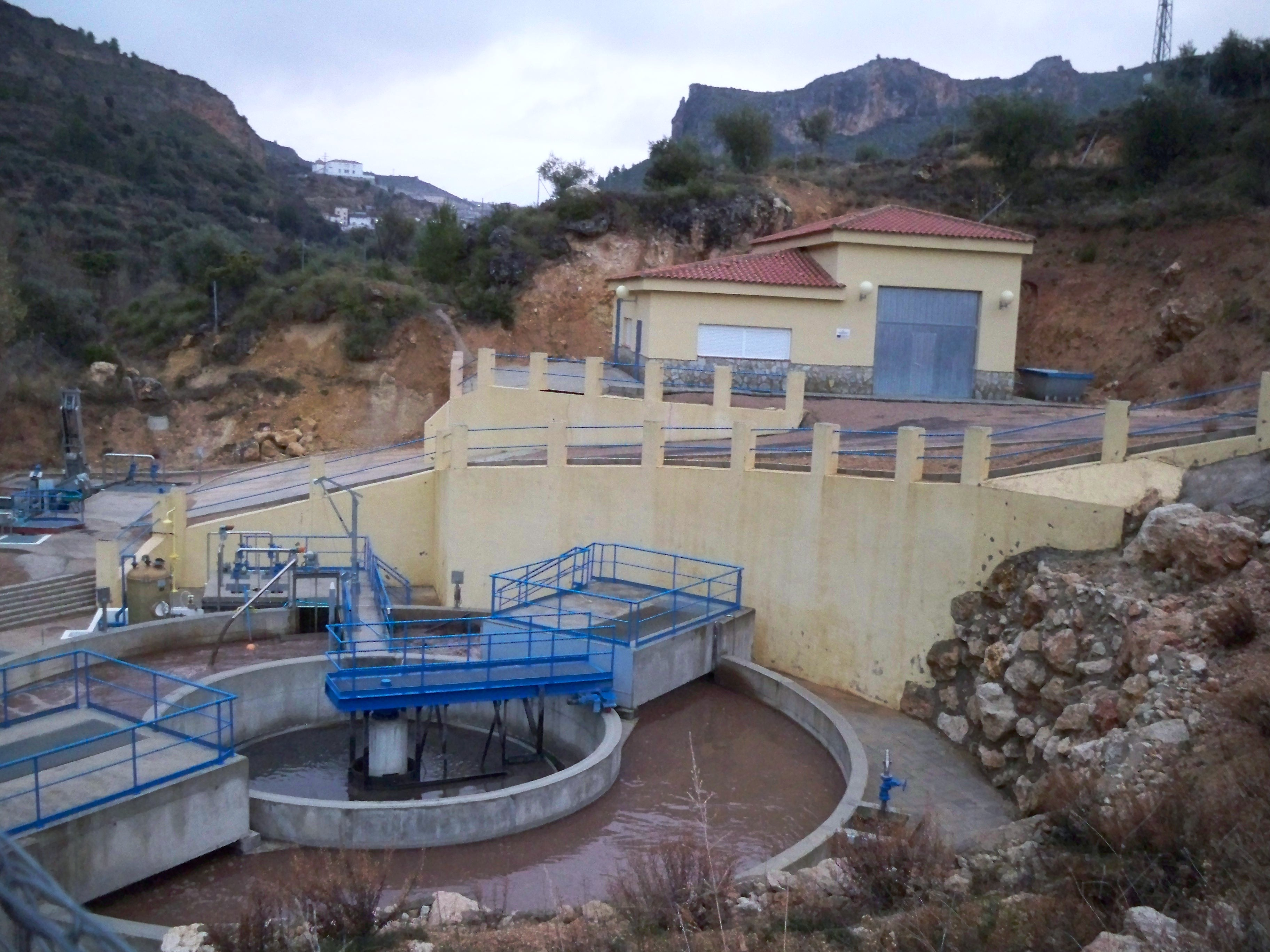 Fotografía de parte de la depuradora de aguas residuales de Molinicos (Albacete)